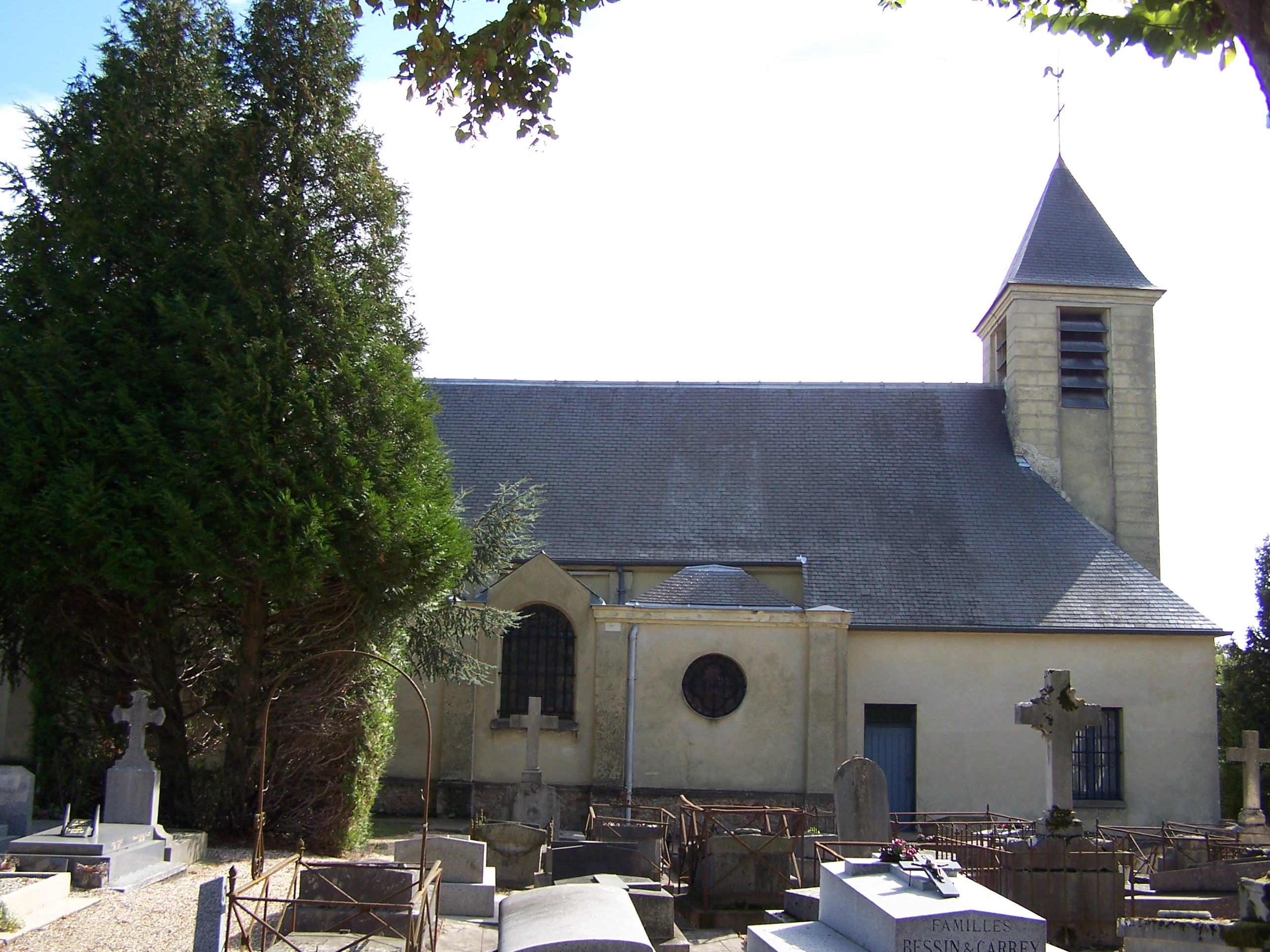 Église Saint-Germain du Chesnay (Yvelines, France)